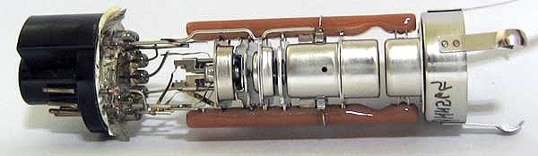 electron gun